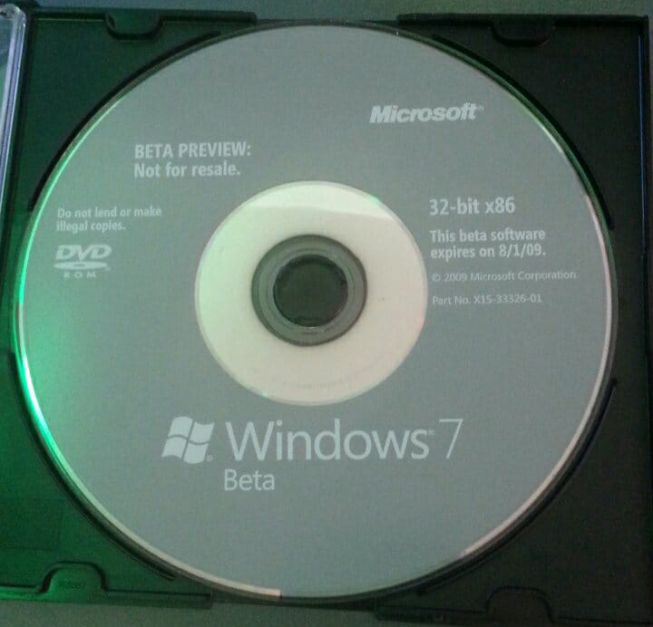 DVD distribué par Microsoft lors d'un concours en 2009. 1000 exemplaire on ainsi été distribué.